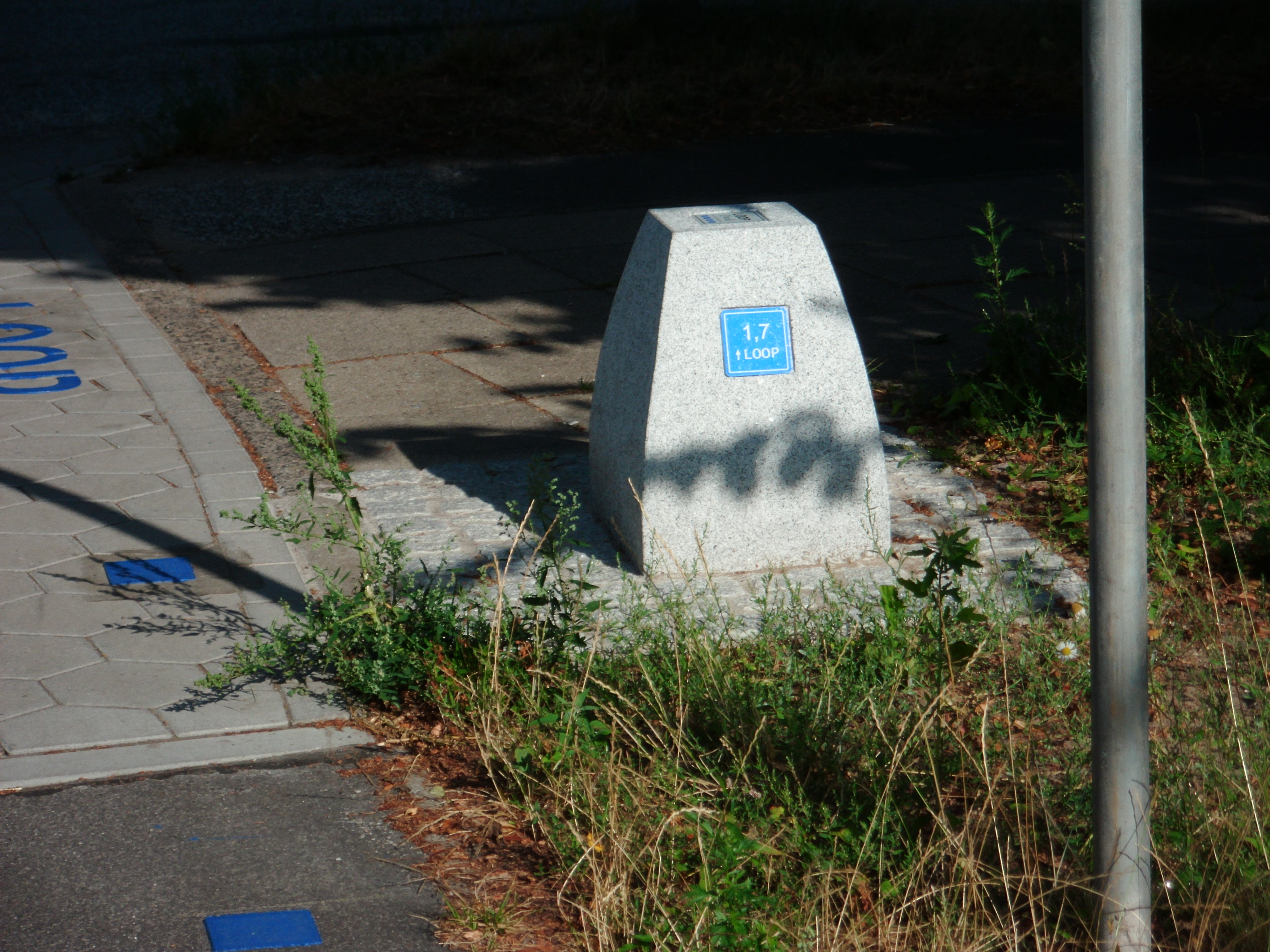 Typische Ausstattung des Rundkurses Loop